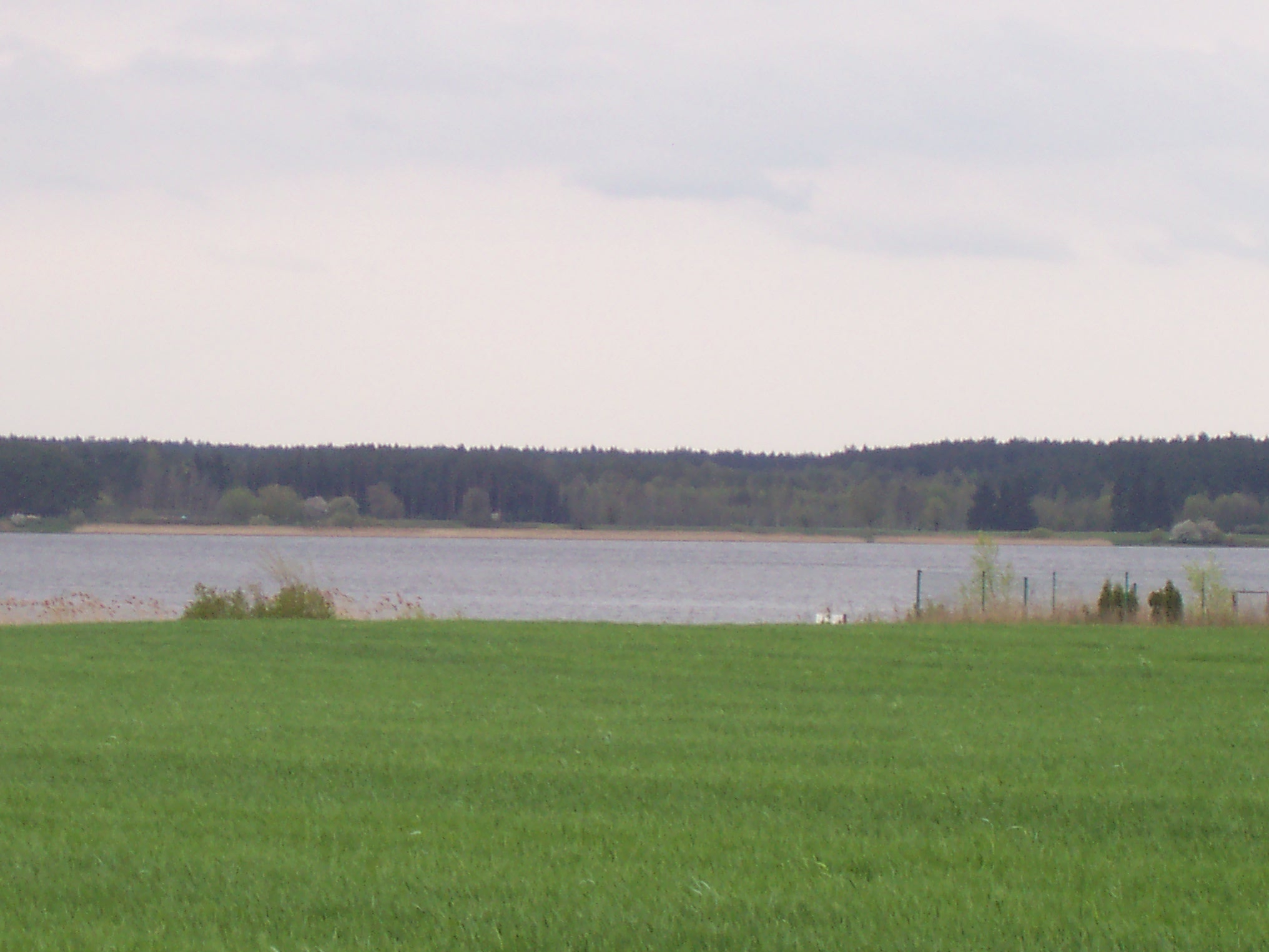 Jezioro Toczyłowo